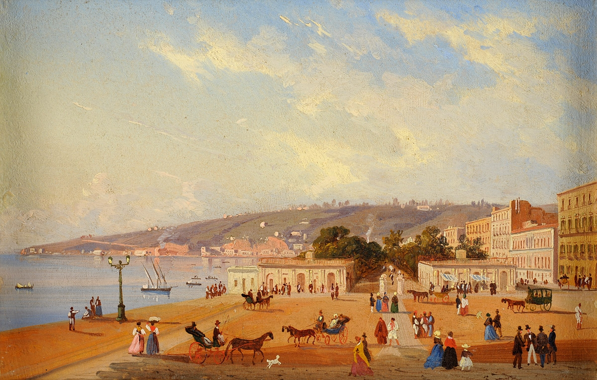 Die Promenade von Neapel.label QS:Lde,"Die Promenade von Neapel."